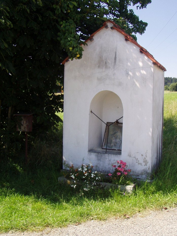 Zásada